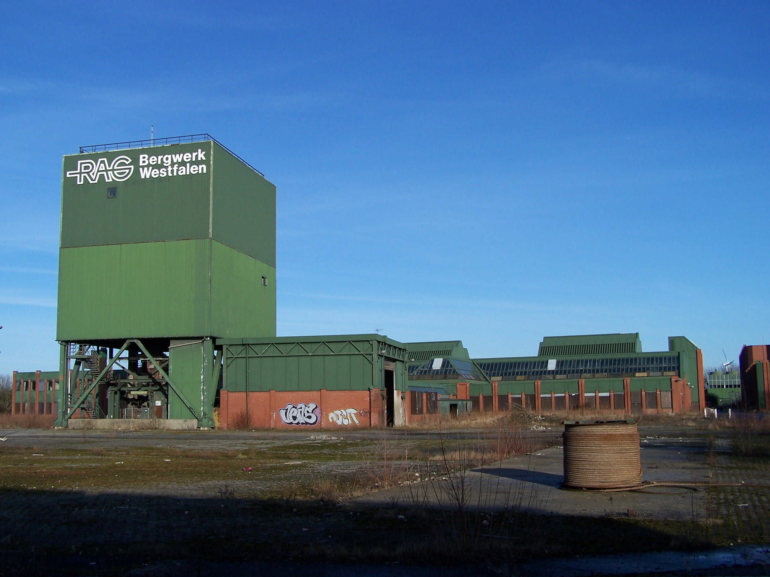 Schacht 7 der Zeche Westfalen, Material- und Seilfahrtschacht, in Hamm/Westfalen